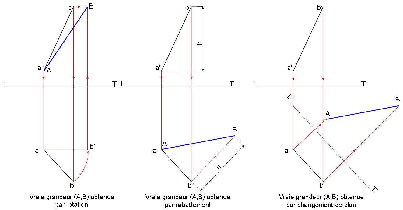 Vraie grandeur d'une droite obtenue avec la technique dite du changement de plan.